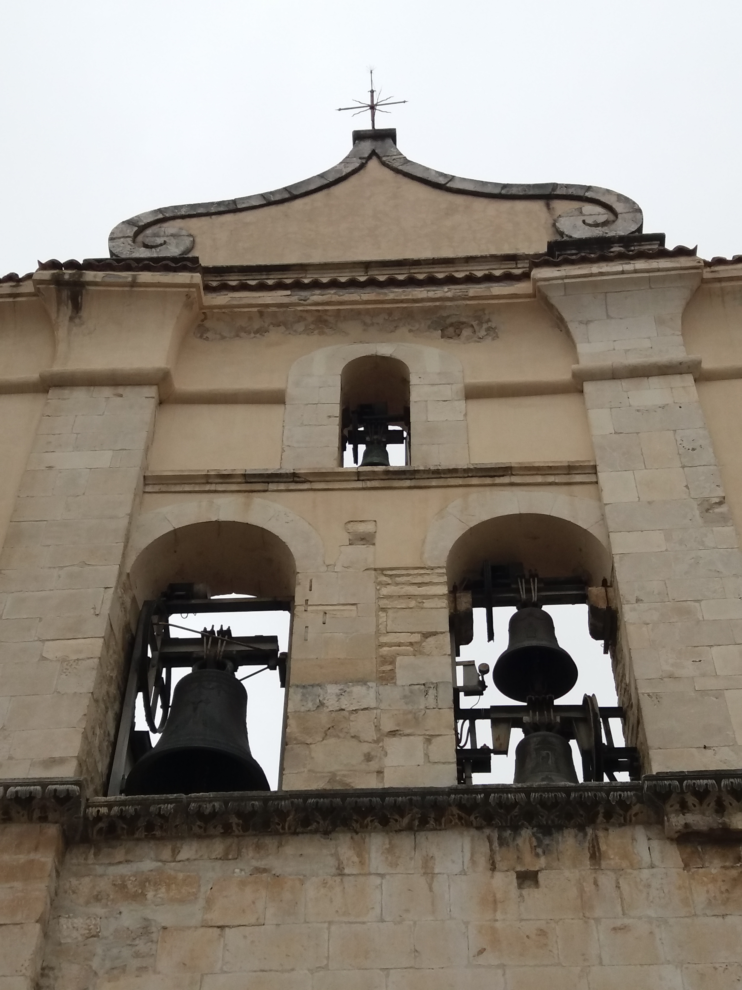 Sulmona: Cattedrale di San Panfilo